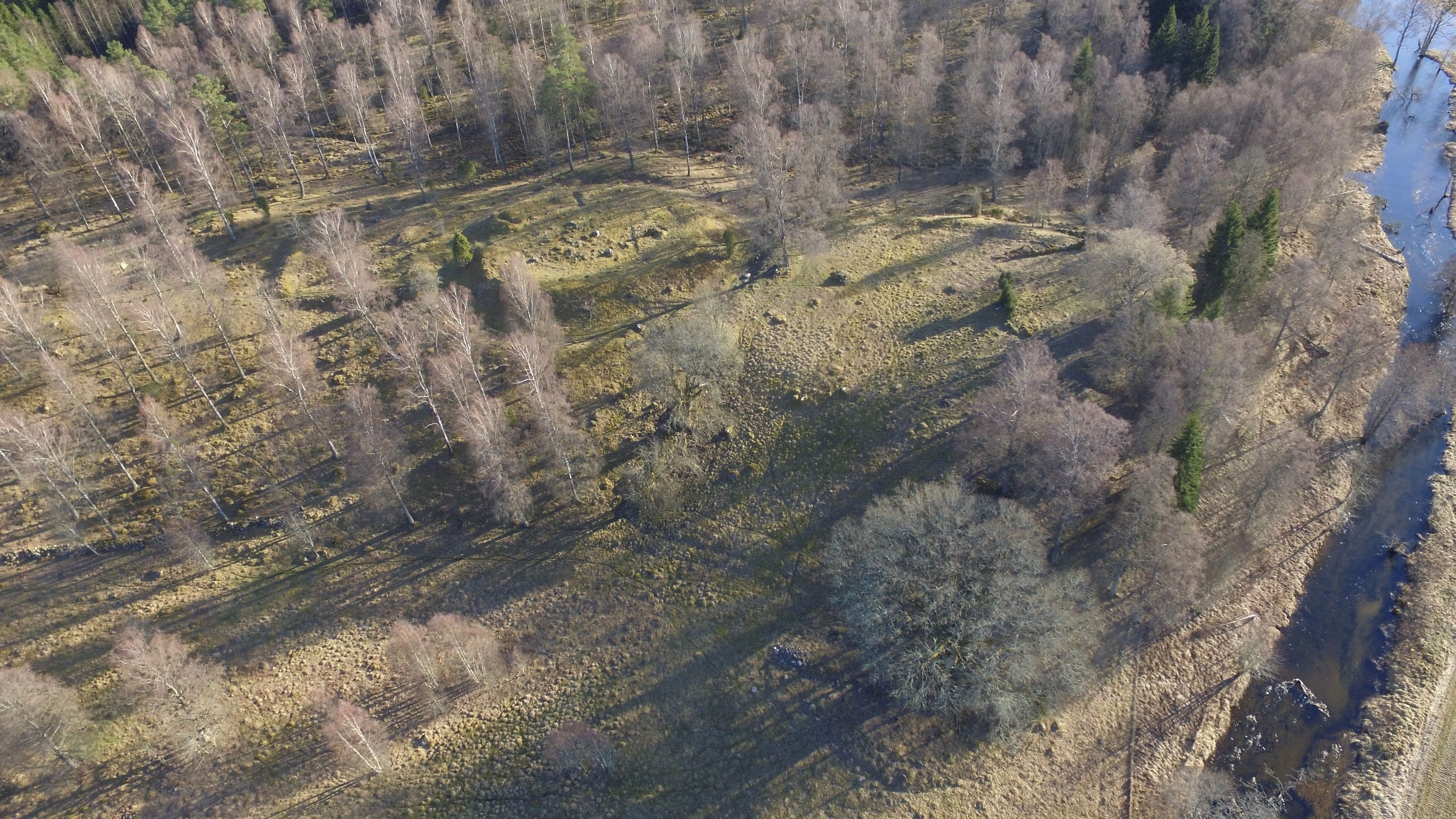 Borgurinen har en förmodad kajanläggning i bildens nederkant. Vattendraget i högerkant är Viskan, som här flyter norrut.